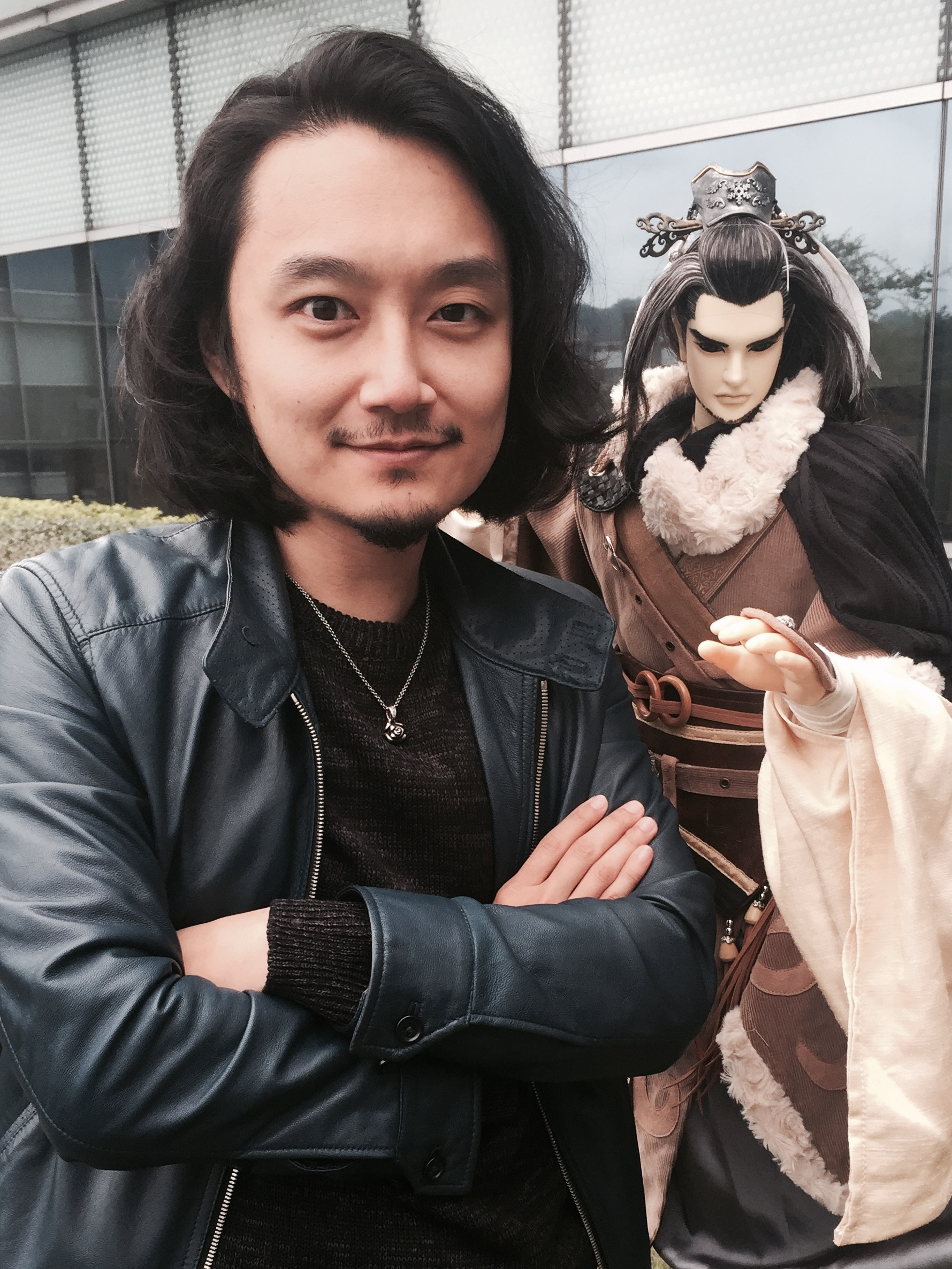 霹靂國際多媒體黃亮勛副總與布袋戲偶合照